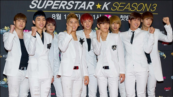 제국의 아이들. 슈퍼스타K 3 하이라이트 시사회 레드카펫 행사장에서